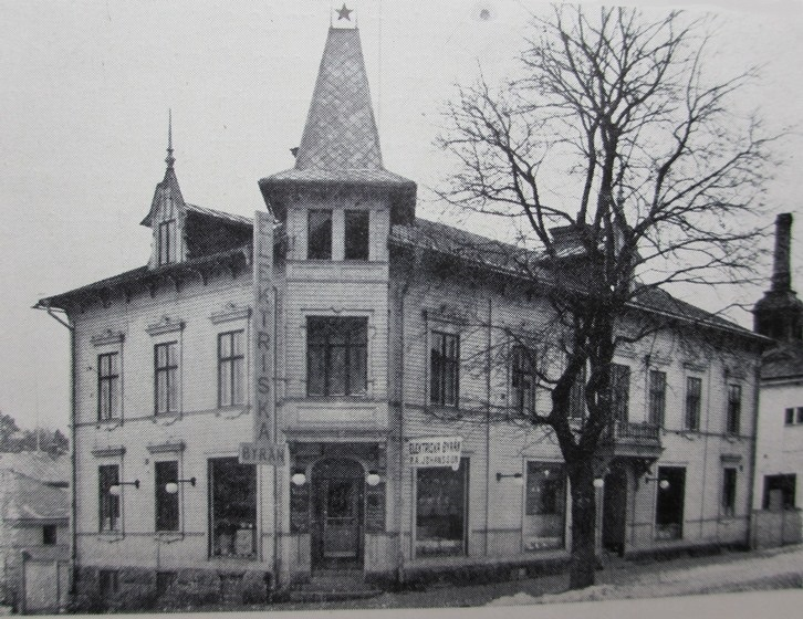 Lönnen 8, Kungsgatan 8 i Söderhamn (byggnaden riven 1979)